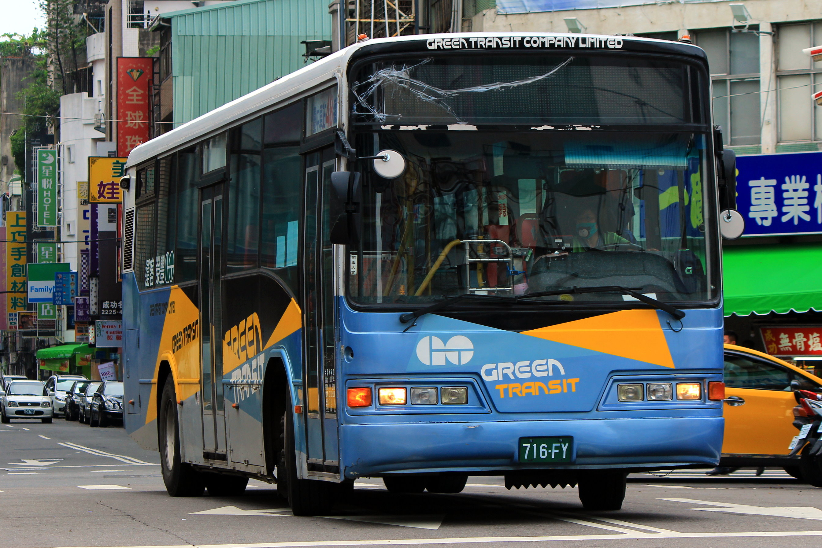 豐榮客運原大南汽車日野ERK大窗車